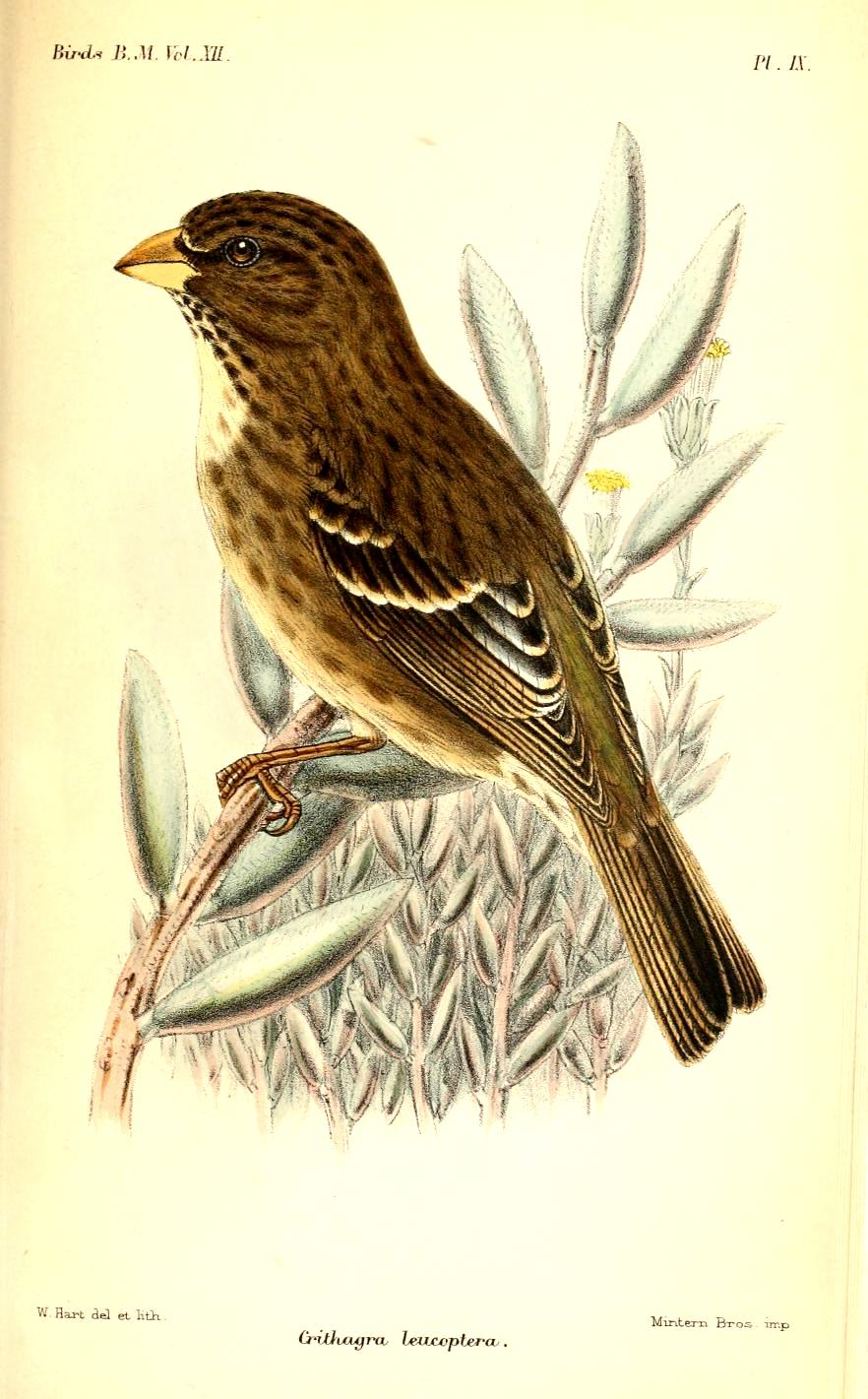 Crithagra leucoptera = Serinus leucopterus Protea Canary